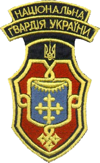 Нарукавний знак, 6 Східна дивізія НГУ